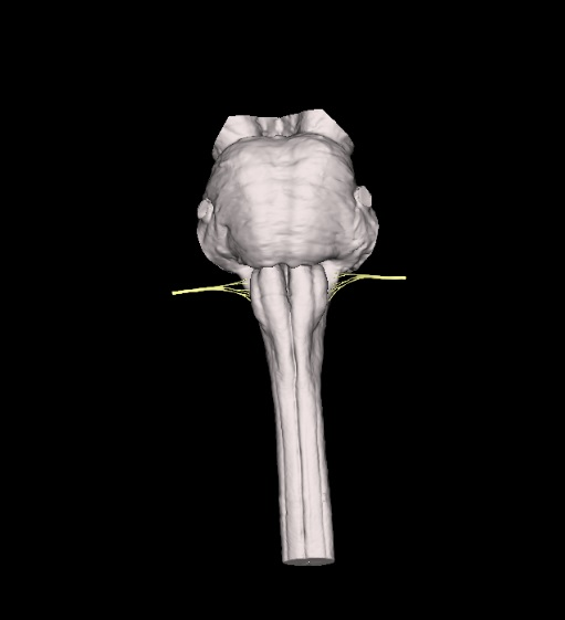 Nerbio bagoa entzefalo enborretik ateratzen